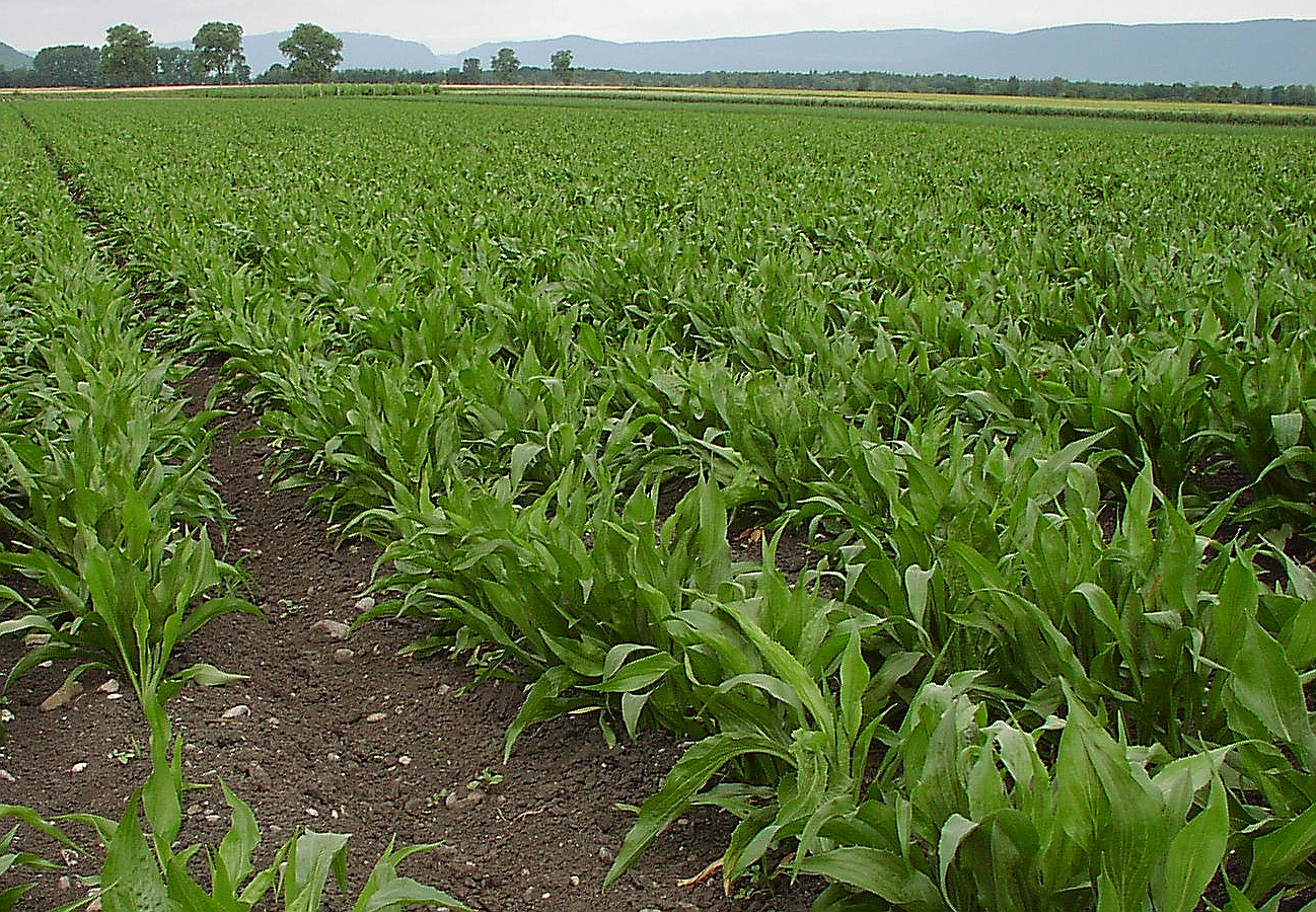 Schwazrwurzel Bestand